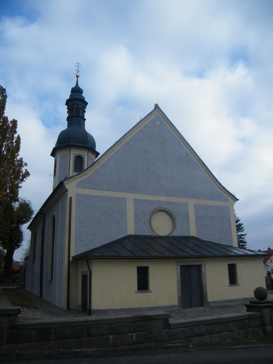 Kostel svatého Bartoloměje ve Velkém Šenově po rekonstrukci